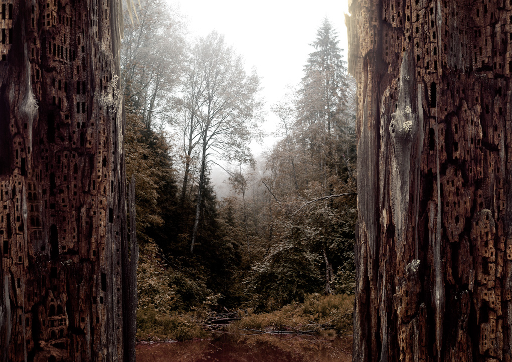 Kakendu jäärak Kütiorus